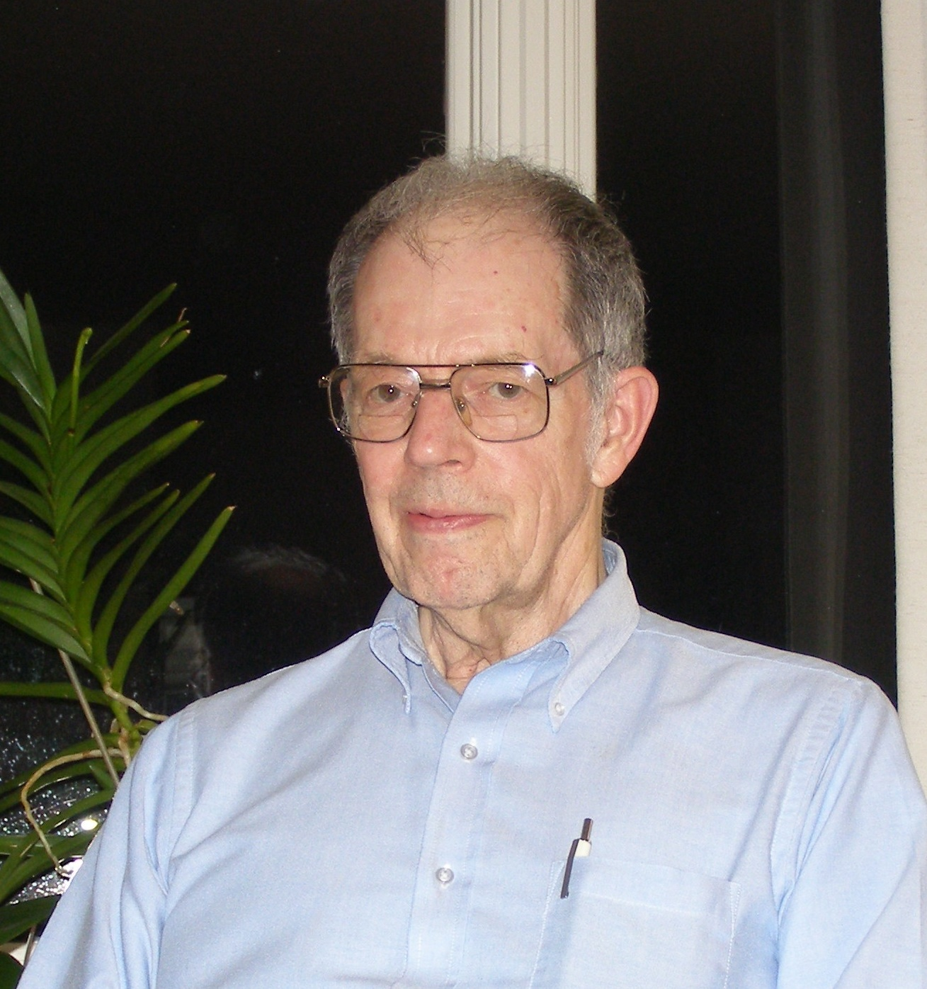 Prof. Howard H. Pattee, Williamstown, Massachusetts, USA